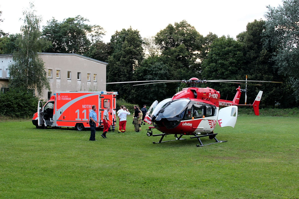 Primäreinsatz für den Christoph Berlin in Berlin-Friedrichsfelde